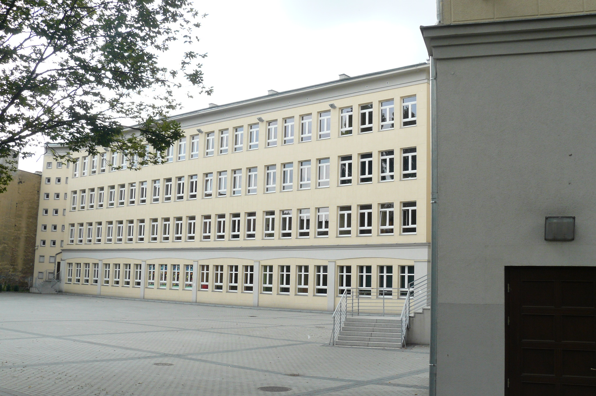 Szkoła przy ul. Łukaszewicza w Poznaniu.